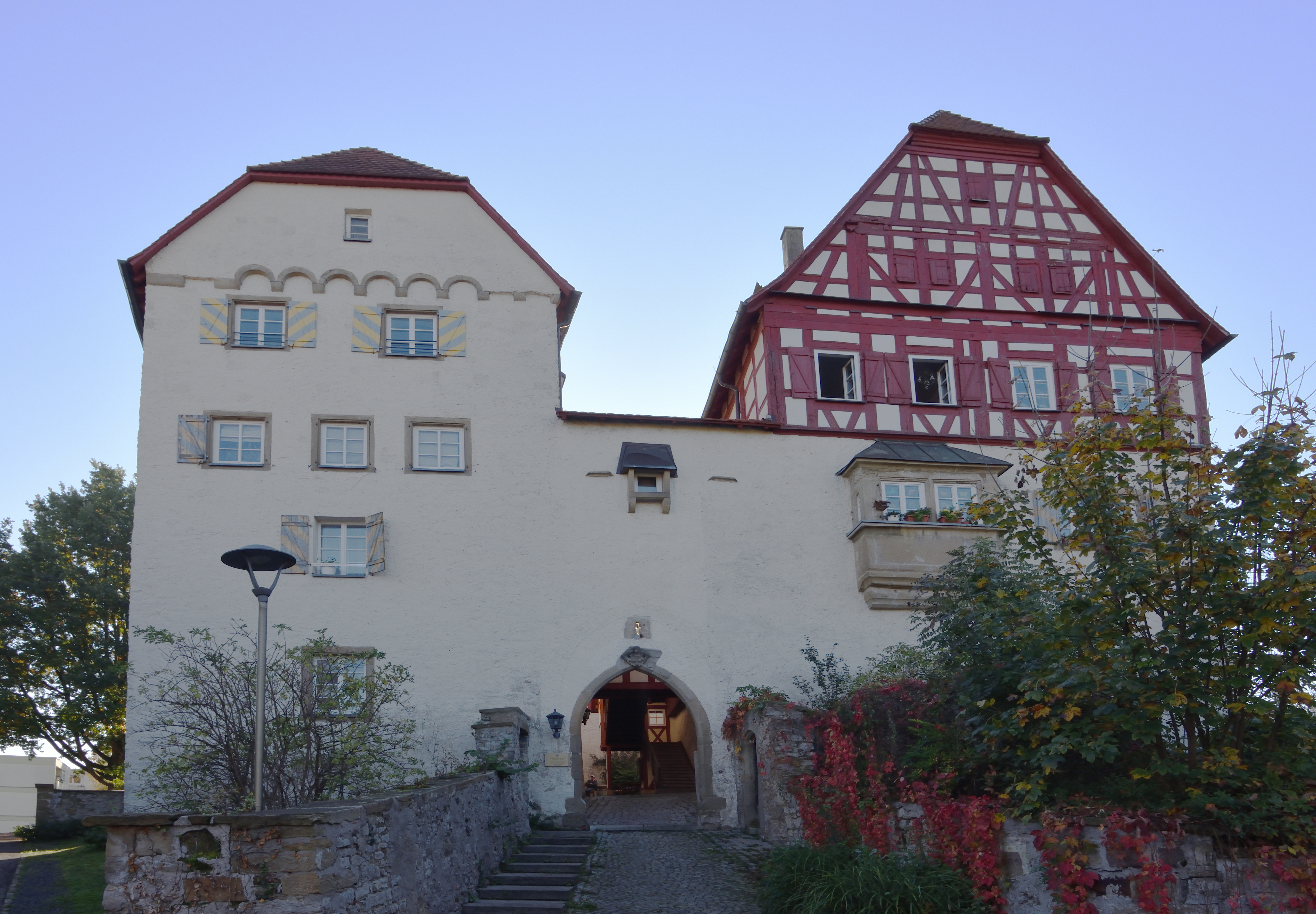 Freiberg am Neckar, Altes Schloss im Stadtteil Beihingen